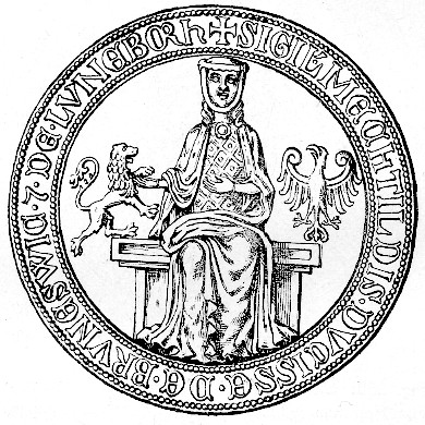 Mechtild von Branderburg, Gemahlin des Herzogs Otto von Braunschweig